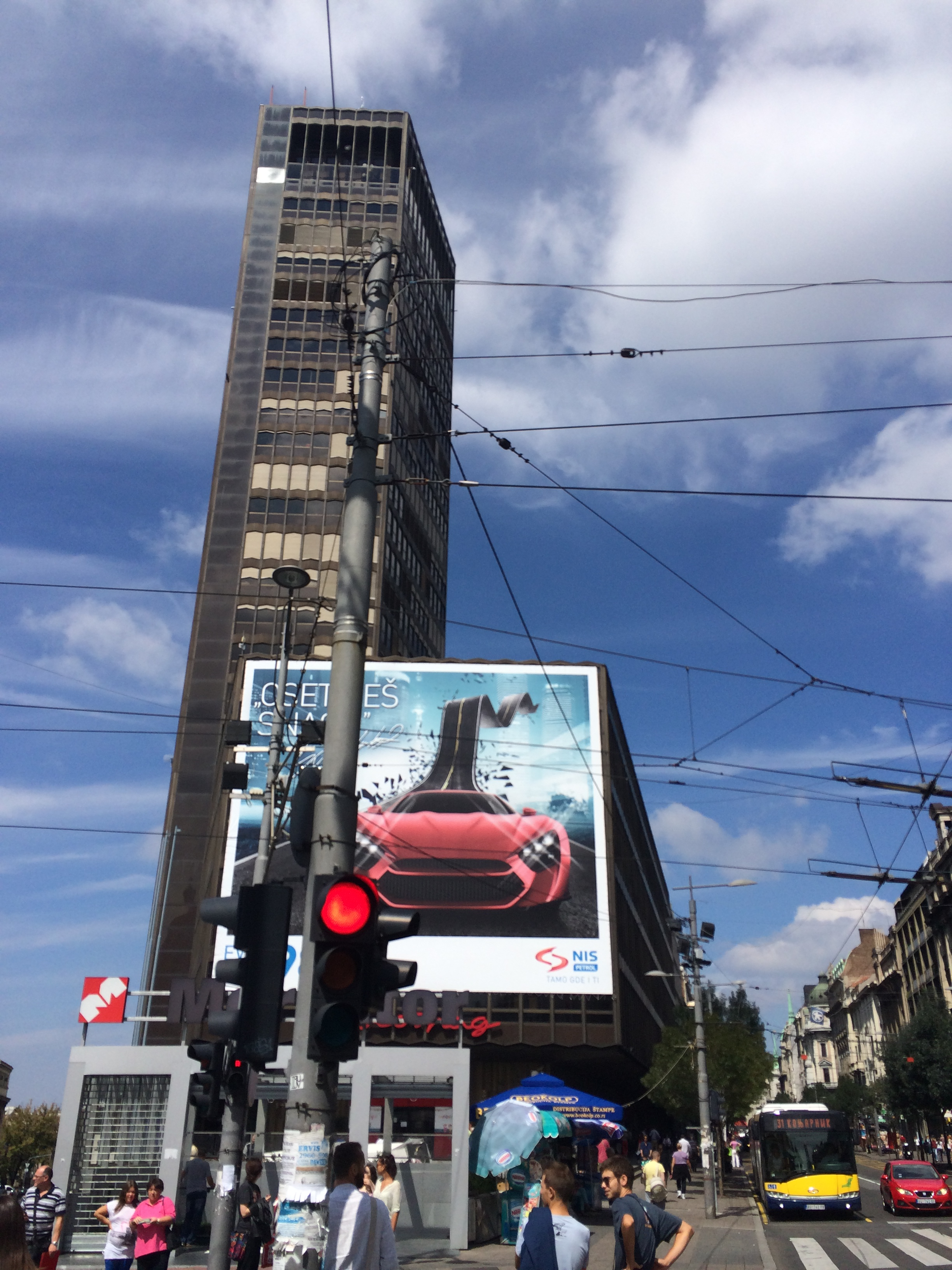 Beogradjanka